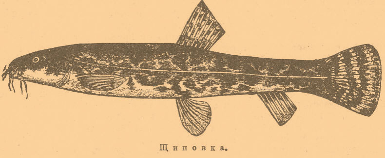 Иллюстрация к статье Щиповка из энциклопедии Брокгауза и Ефрона